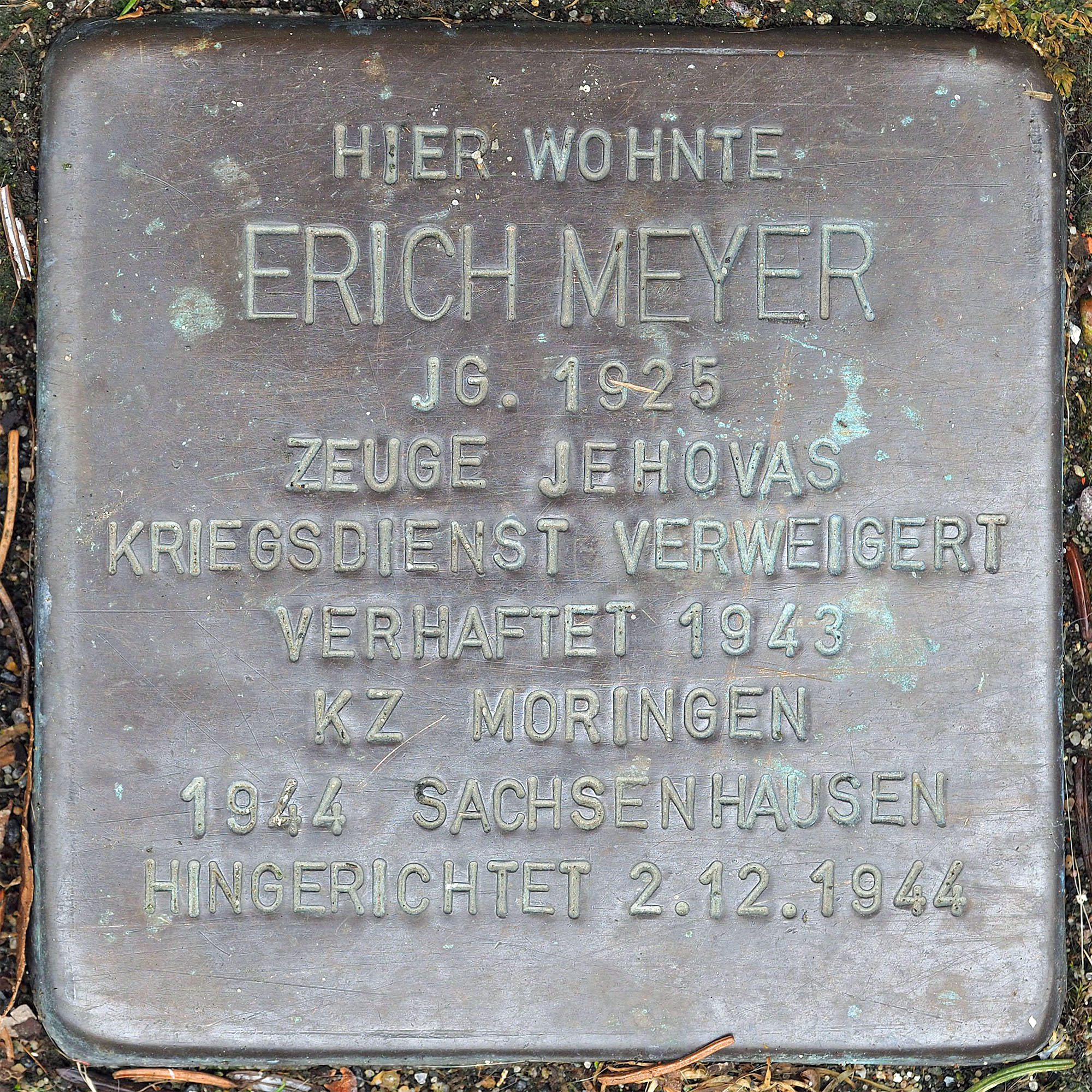 Stolpersteine MG: Meyer, Erich